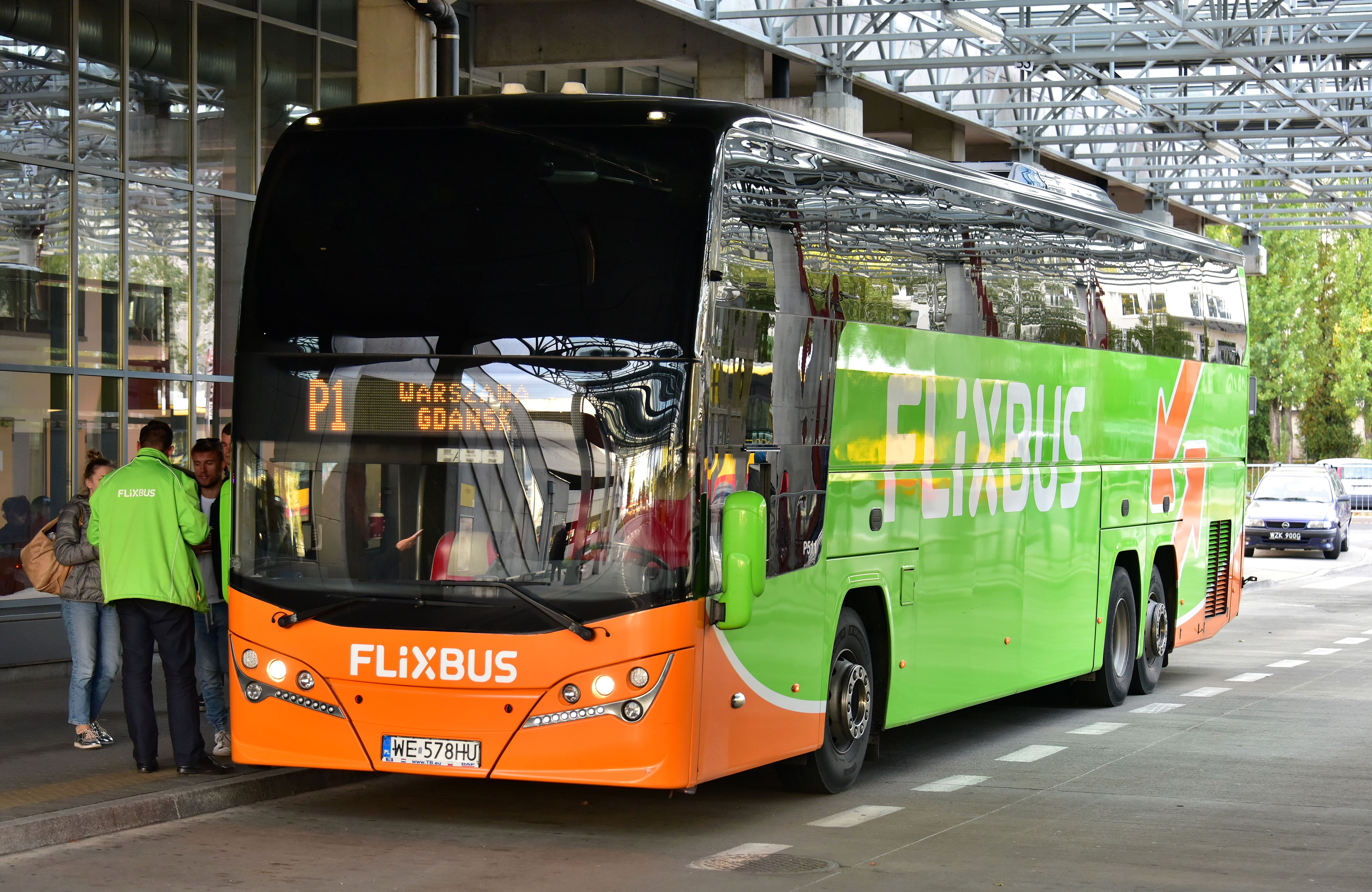 FlixBus na przystanku autobusowym w zespole przystankowym Młociny w Warszawie